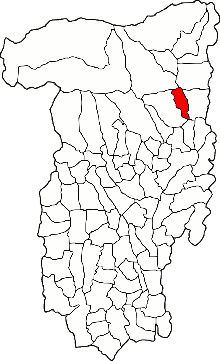 Lage der Gemeinde Sălătrucel im Kreis Vâlcea (RO).